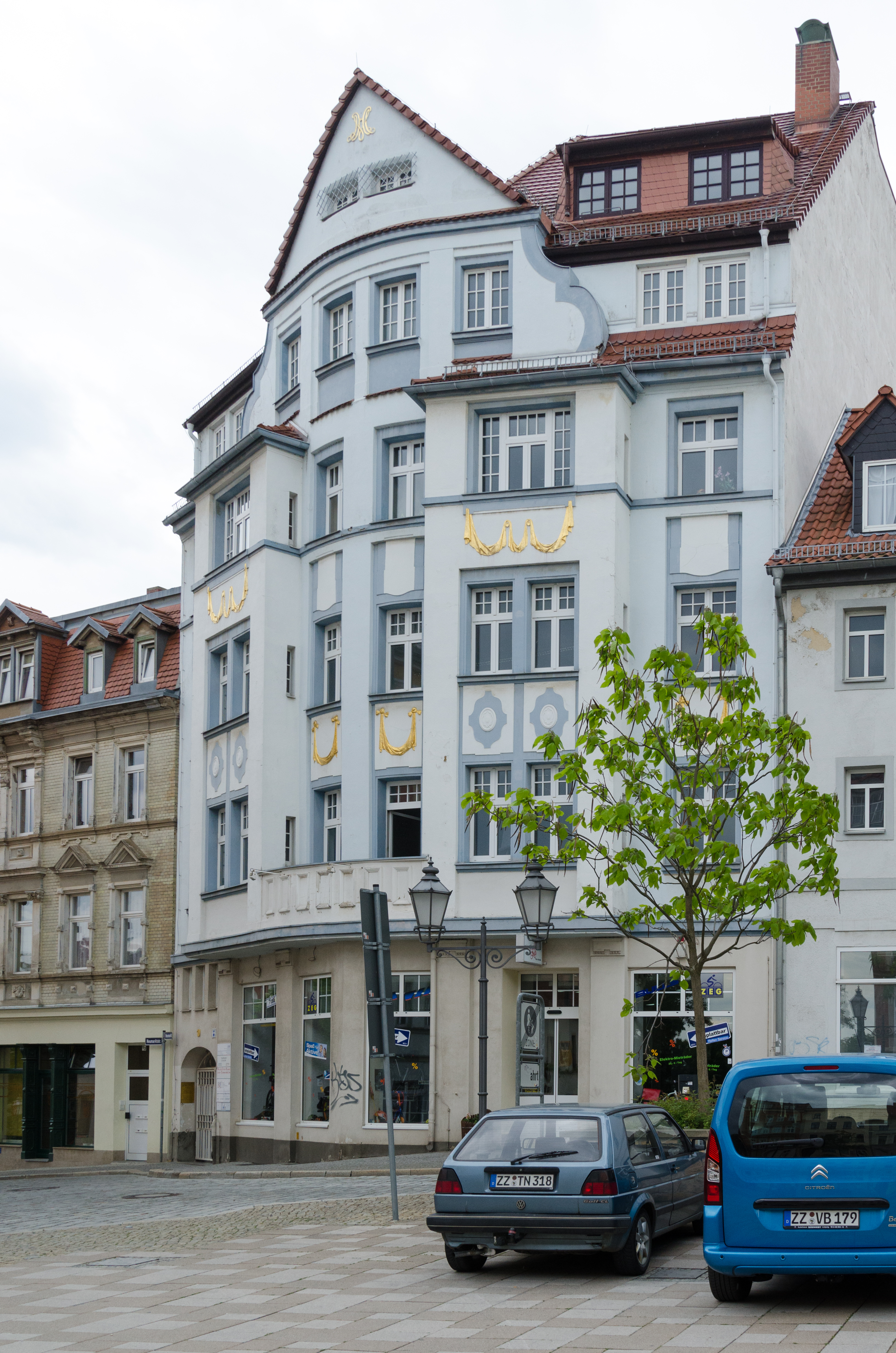 Zeitz, Neumarkt 10